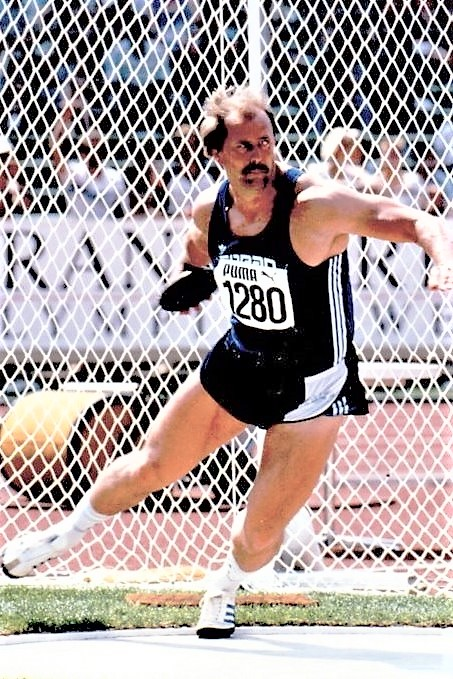 Alwin J. Wagner - 1985 zum 5. Mal in Folge deutscher Meister